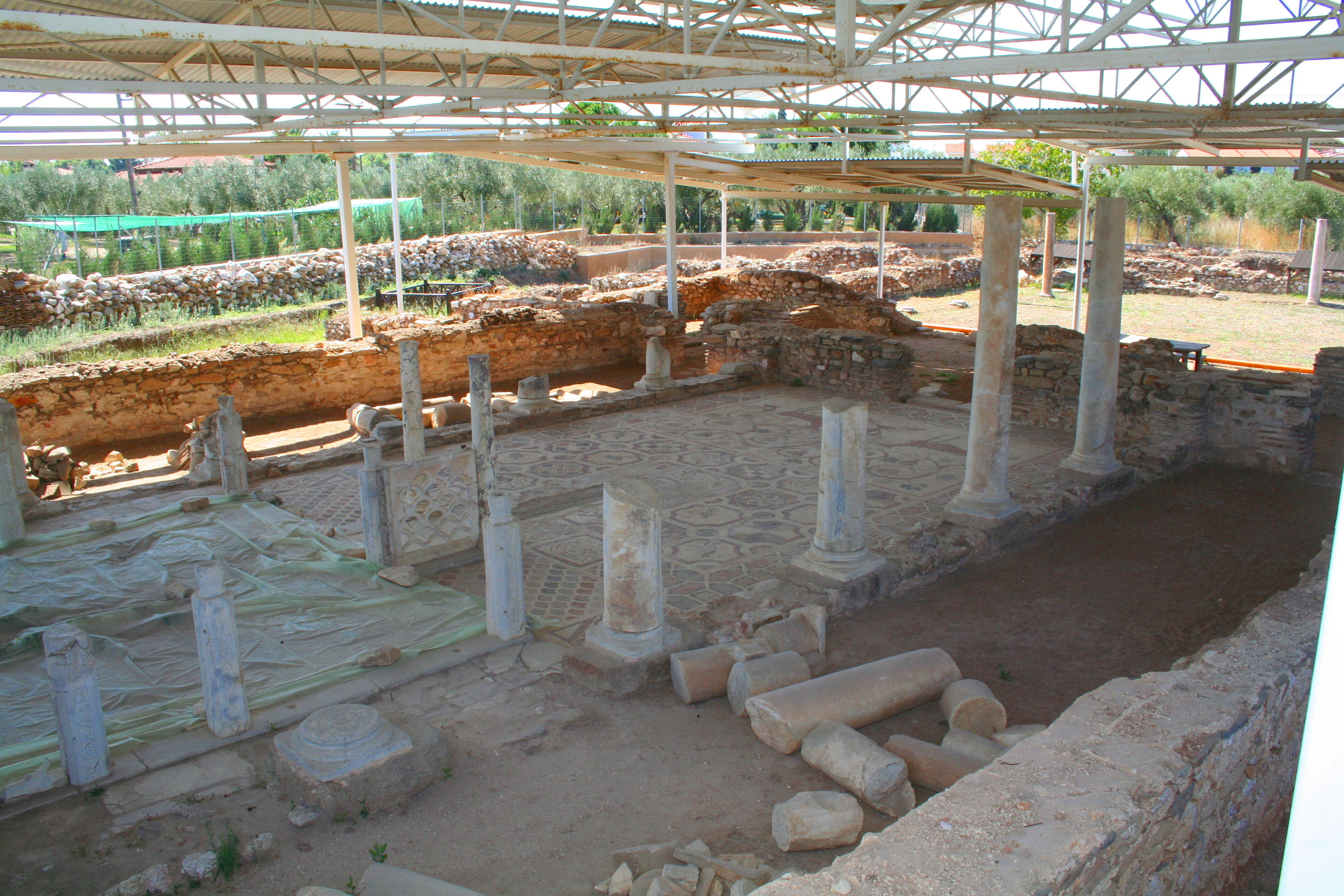 Ausgrabungsstätte Ágios Sofrónios